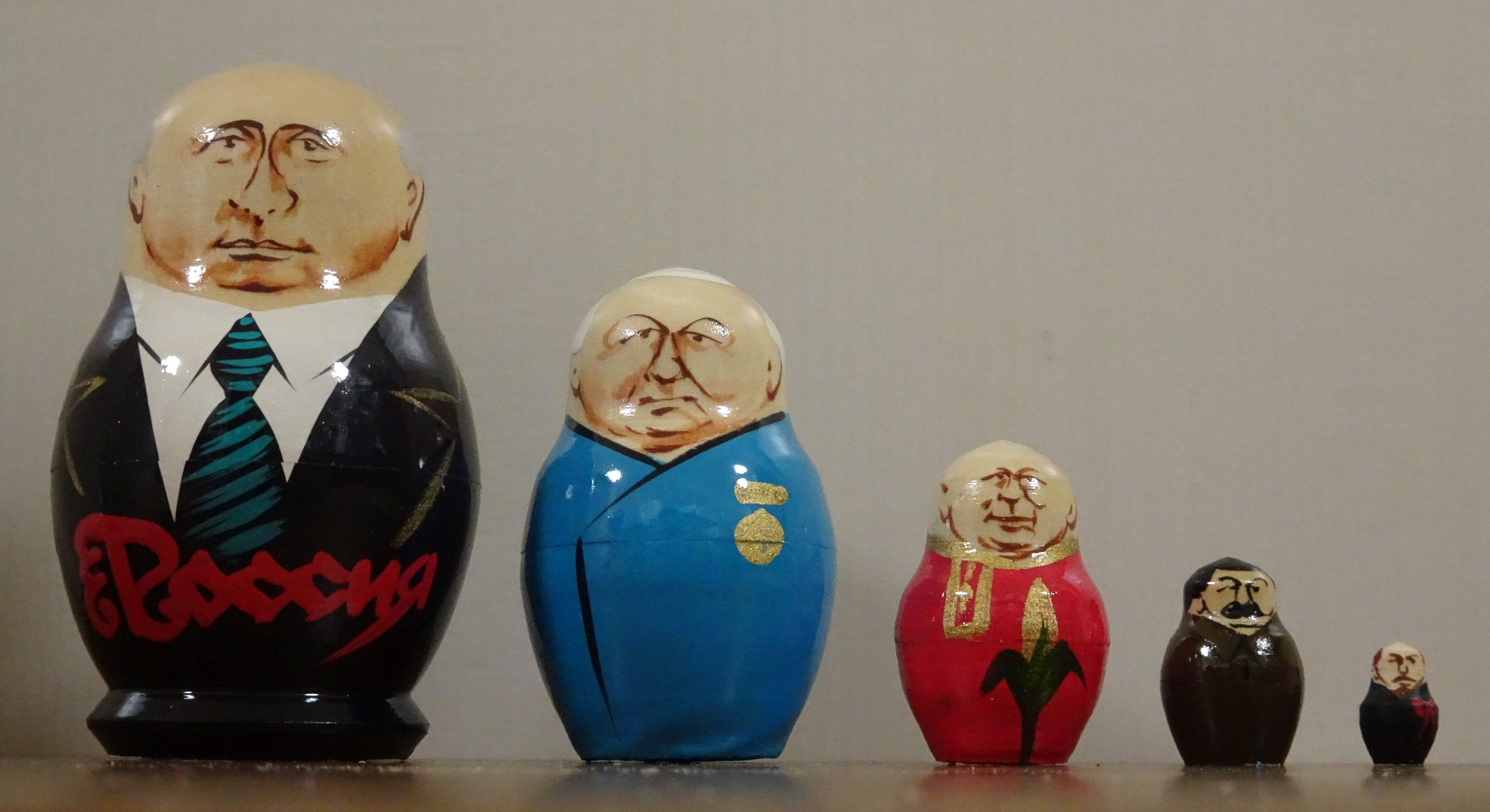 Матрёшка-Russian leaders マトリョーシカ. Bought in Russia 2017. photo Dec. 2017 by ShimadaK.